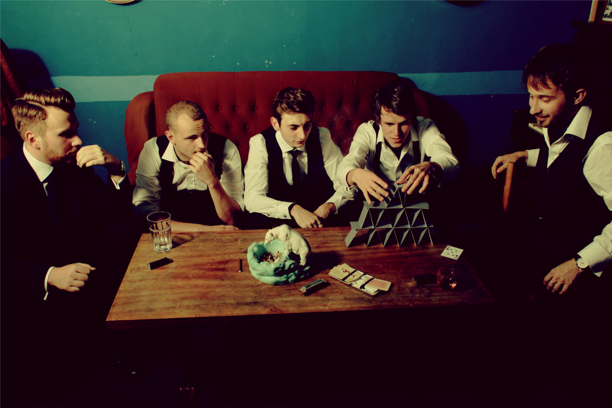 RJs band